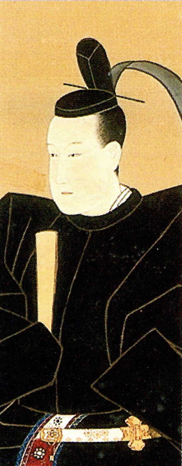 細川斉樹の肖像(部分)。